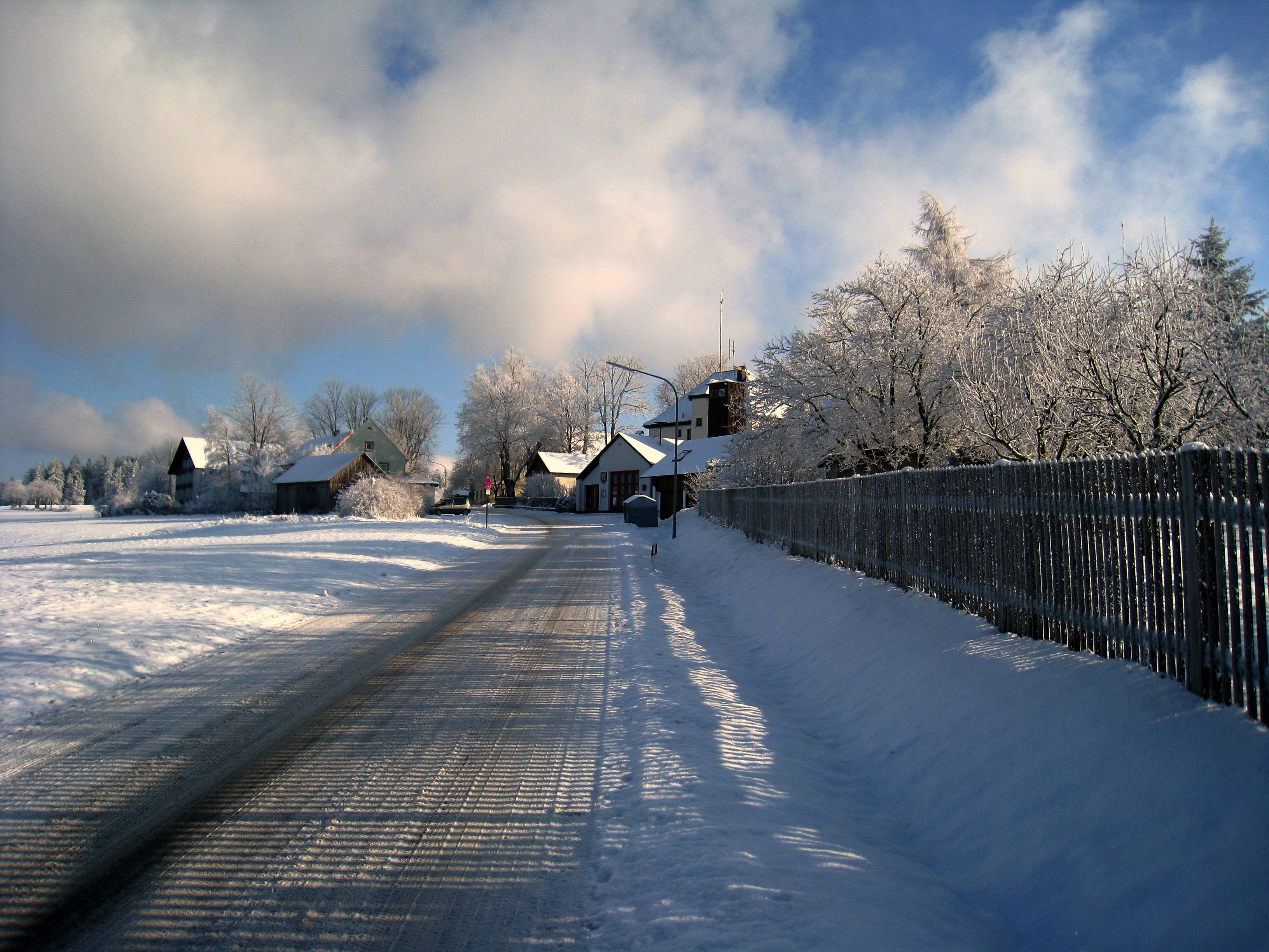 Deutschland Bayern Oberfranken Wülfersreuth